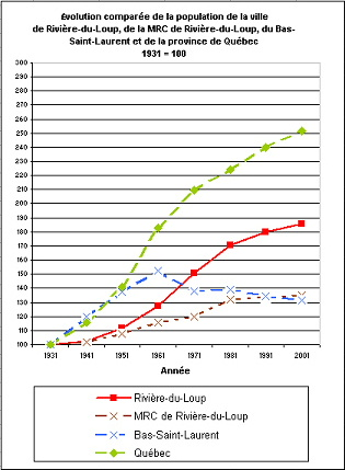 évolution comparée de la population de la Ville de Rivière-du-Loup et de la population du Bas-Saint-Laurent, du Québec et du Canada, entre 1931 et 2001. Graphique : Nicolas Gagnon. Source : recensements du Canada